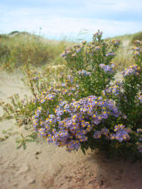 Voorbeeld van kleurverzadiging.